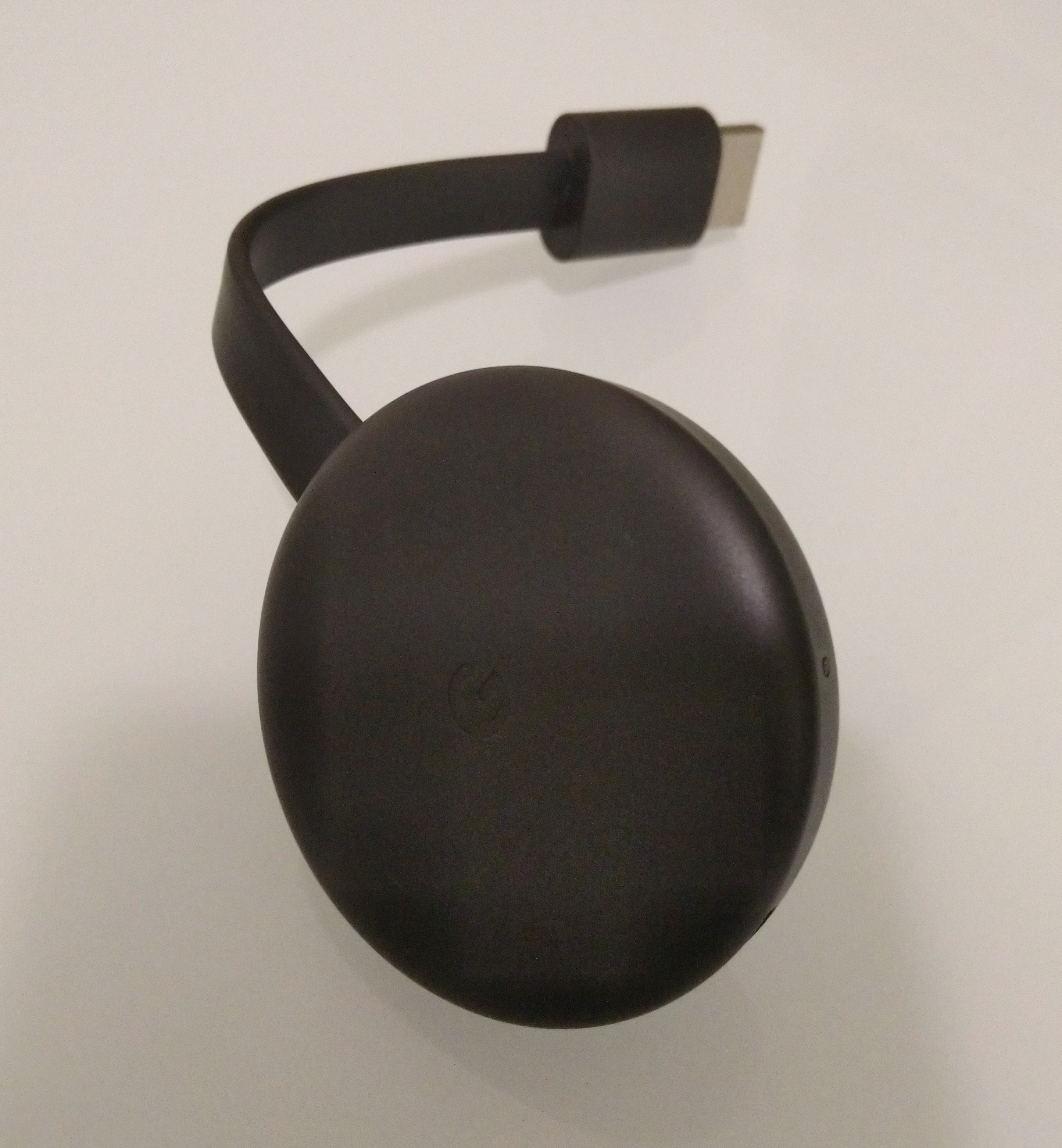 Chromecast 2018